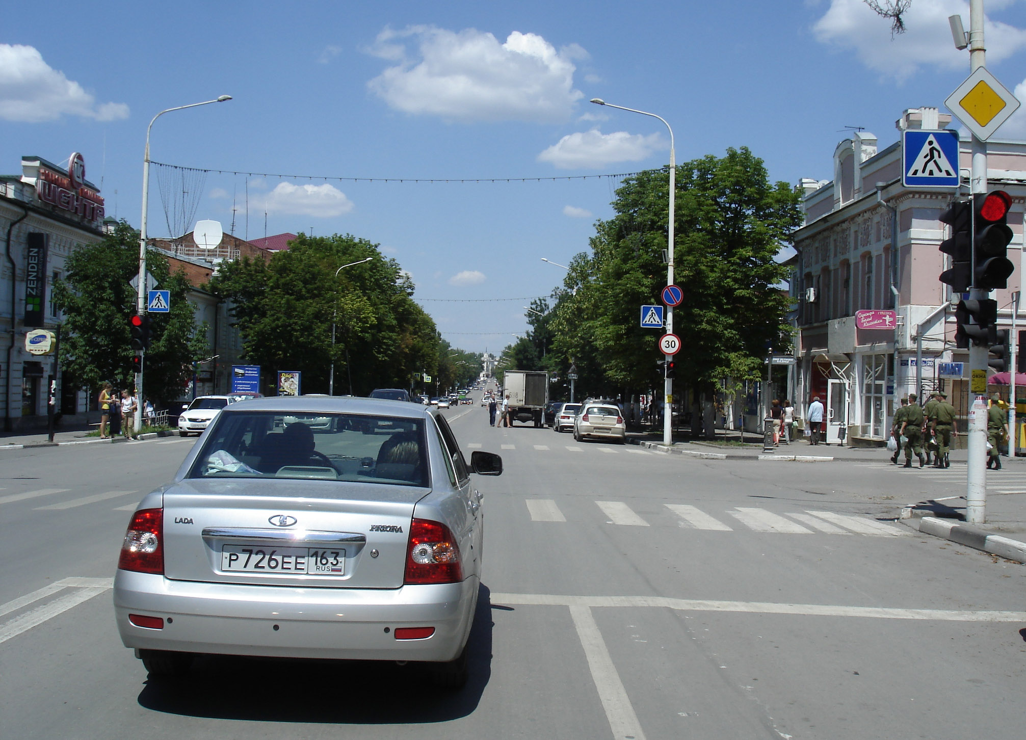 Улица Московская в Новочеркасске